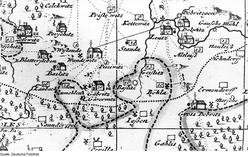 Original image description from the Deutsche Fotothek Priestewitz-Böhla. Karte des Amtes Großenhain, von Zürner, 1711, Nachträge 1730 (Sign.: VII 108)